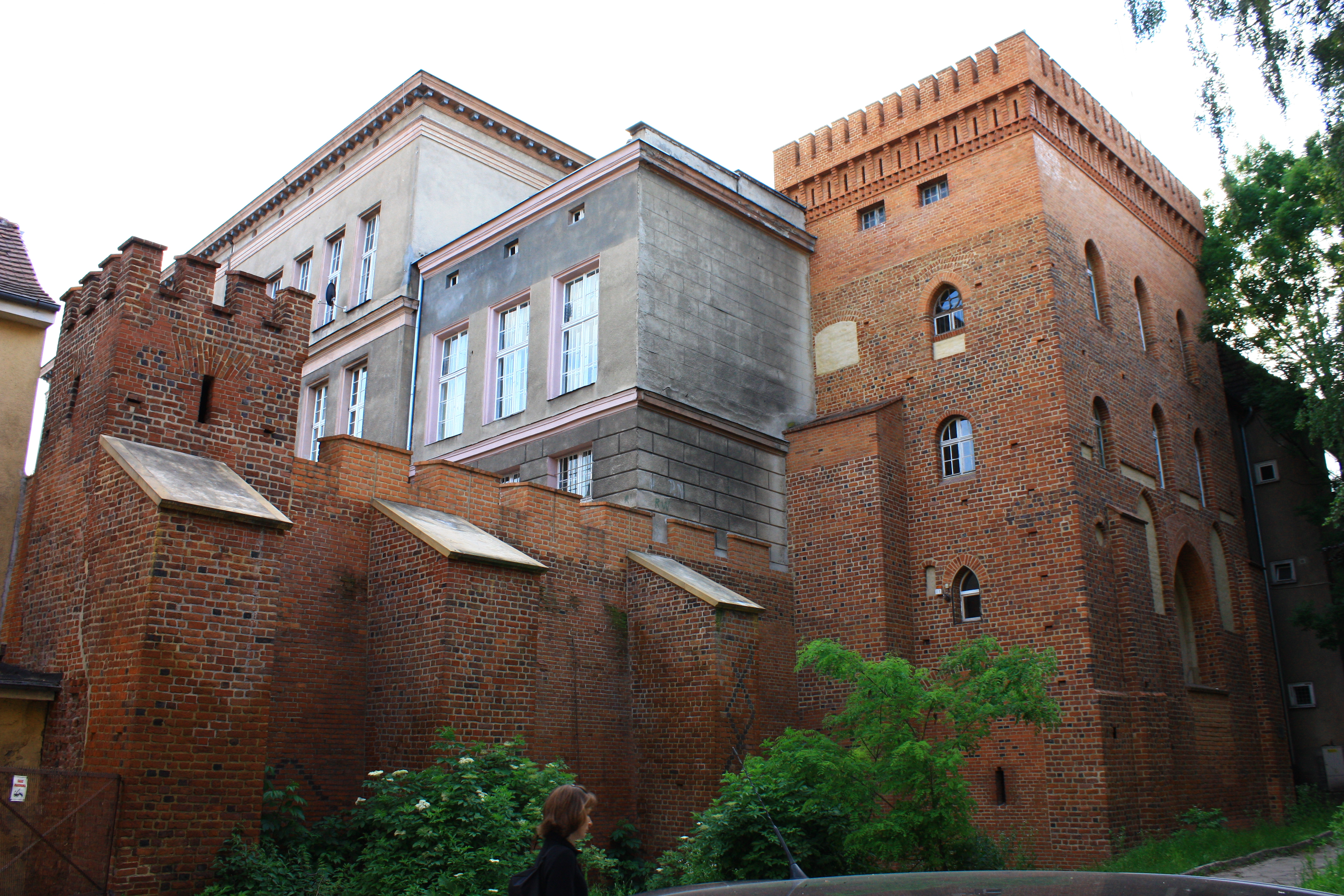 Opole, wieża zamku górnego z fragmentem murów, ob. fragment zabudowań Liceum Technicznego, kon. XIV, XIX